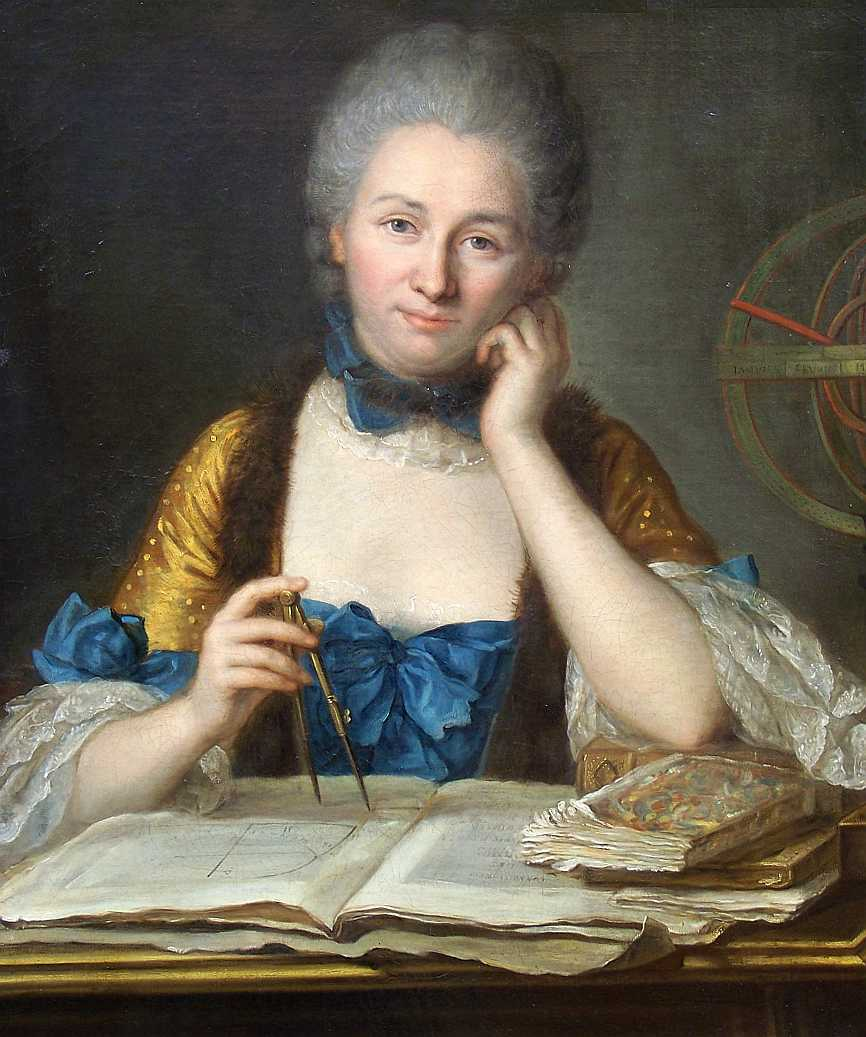 Depicted person: Gabrielle Émilie Le Tonnelier de Breteuil, marquise du Châtelet (1706-1749), French mathematician and physicist